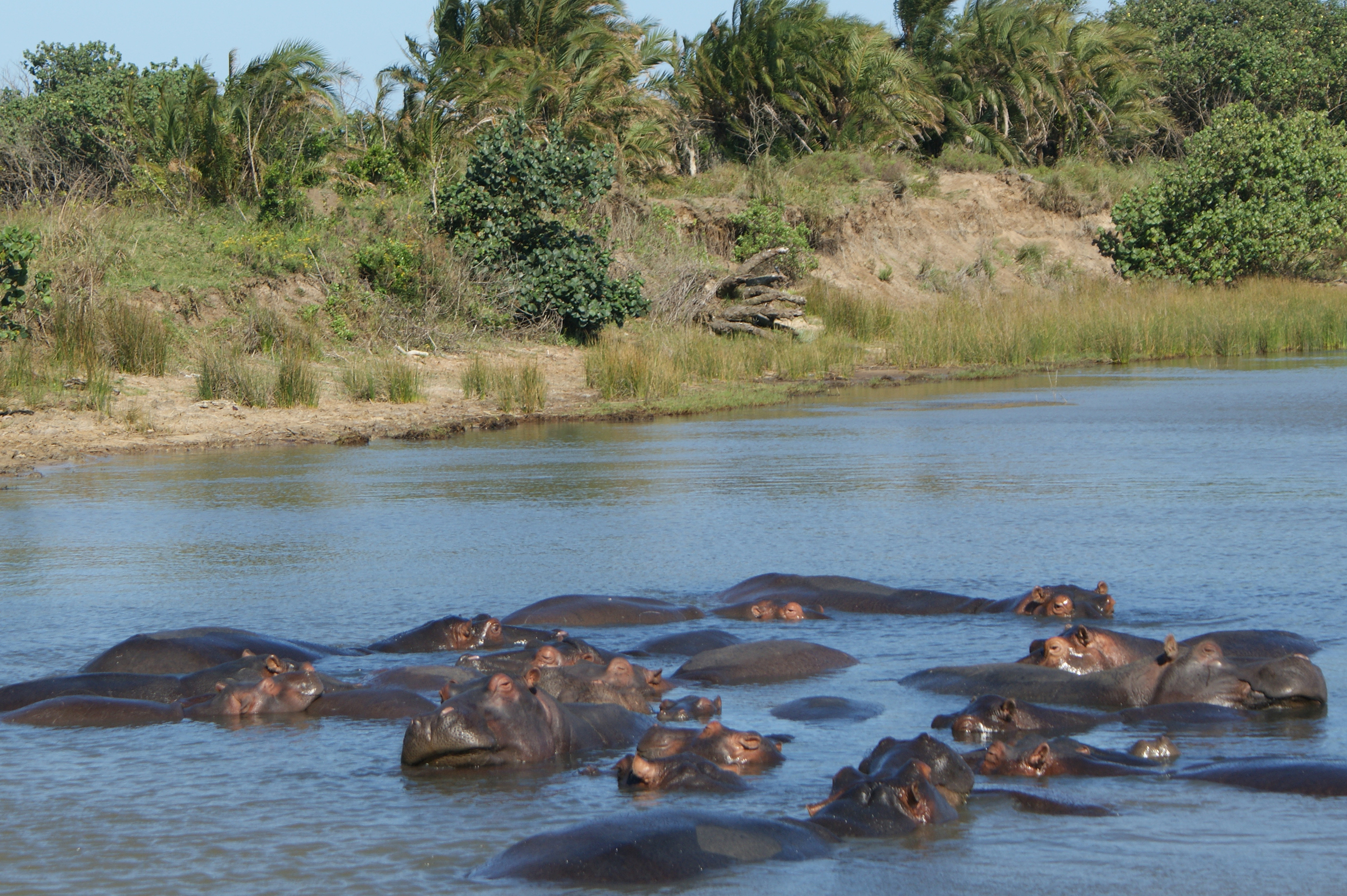 Greater St. Lucia